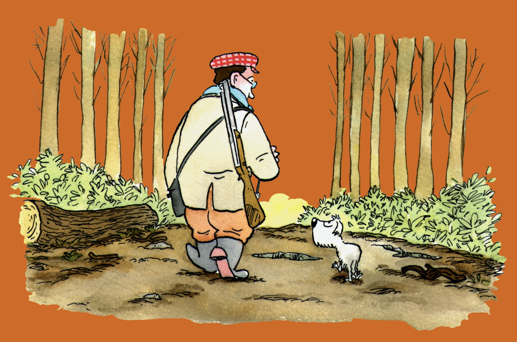 Jatorrizko azalaren argazkia moztu egin dugu